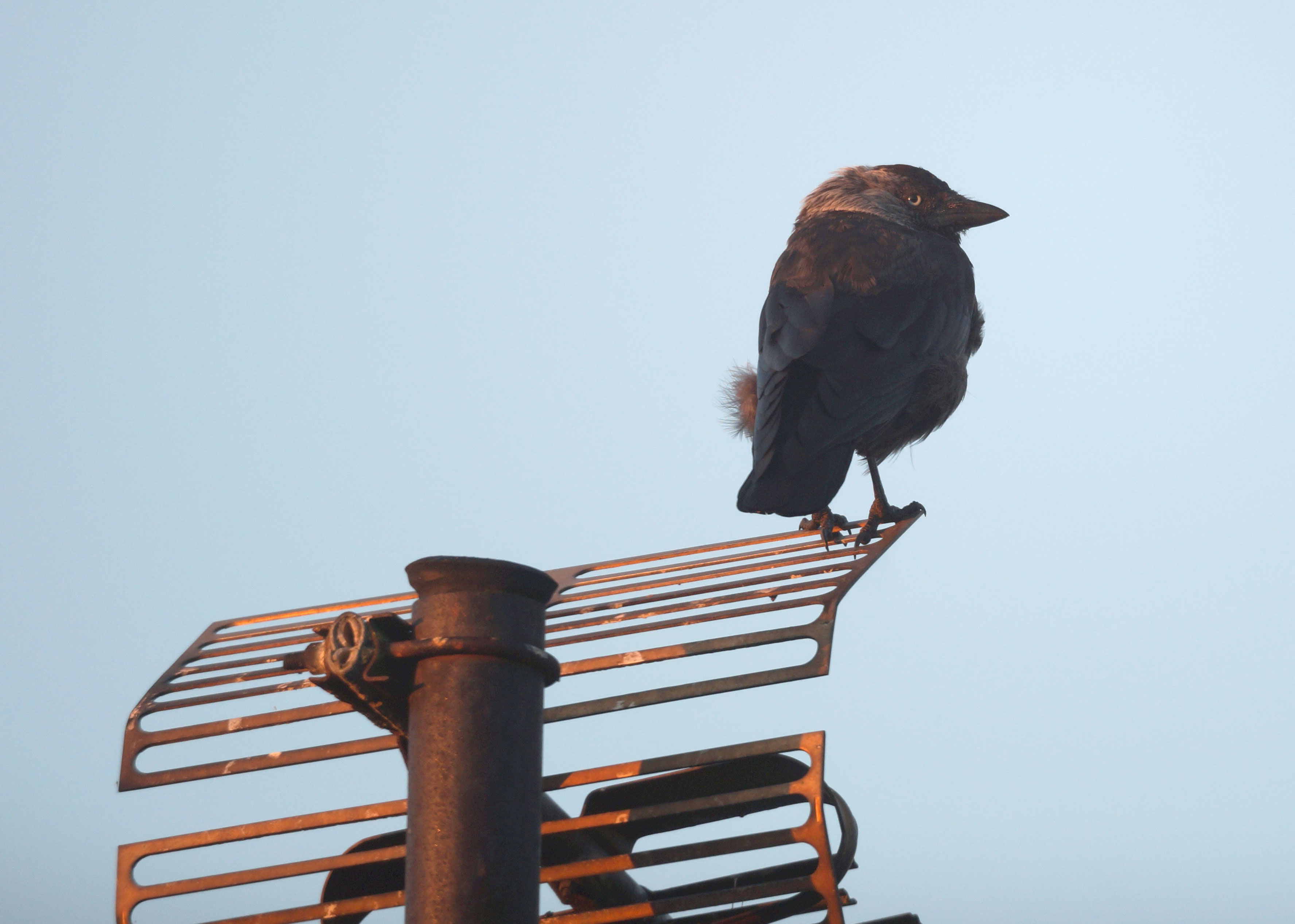 Hakk Tartus antenni otsas